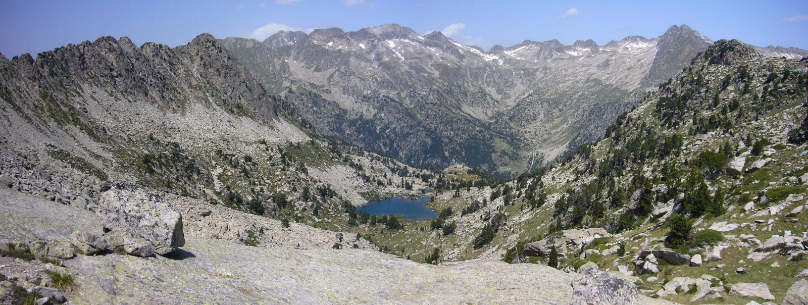 Vall de les Corticelles i Vall de Contraix; la Vall de Boí, Alta Ribagorça, Catalunya